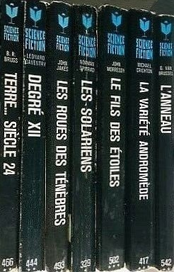 Quelques volumes Marabout SF.